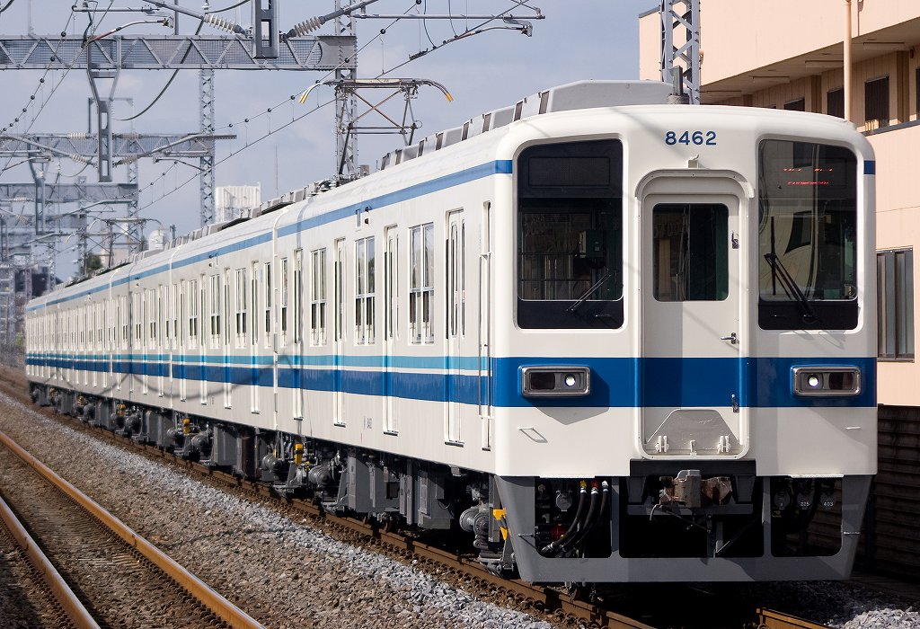 東武8000系8162Fです。